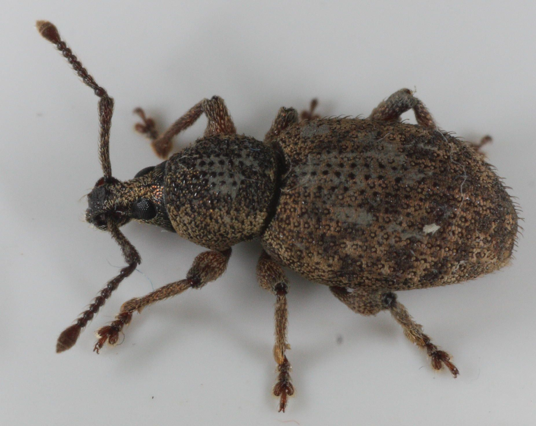 Rognesnutebille Otiorhynchus scaber.Template:Byline